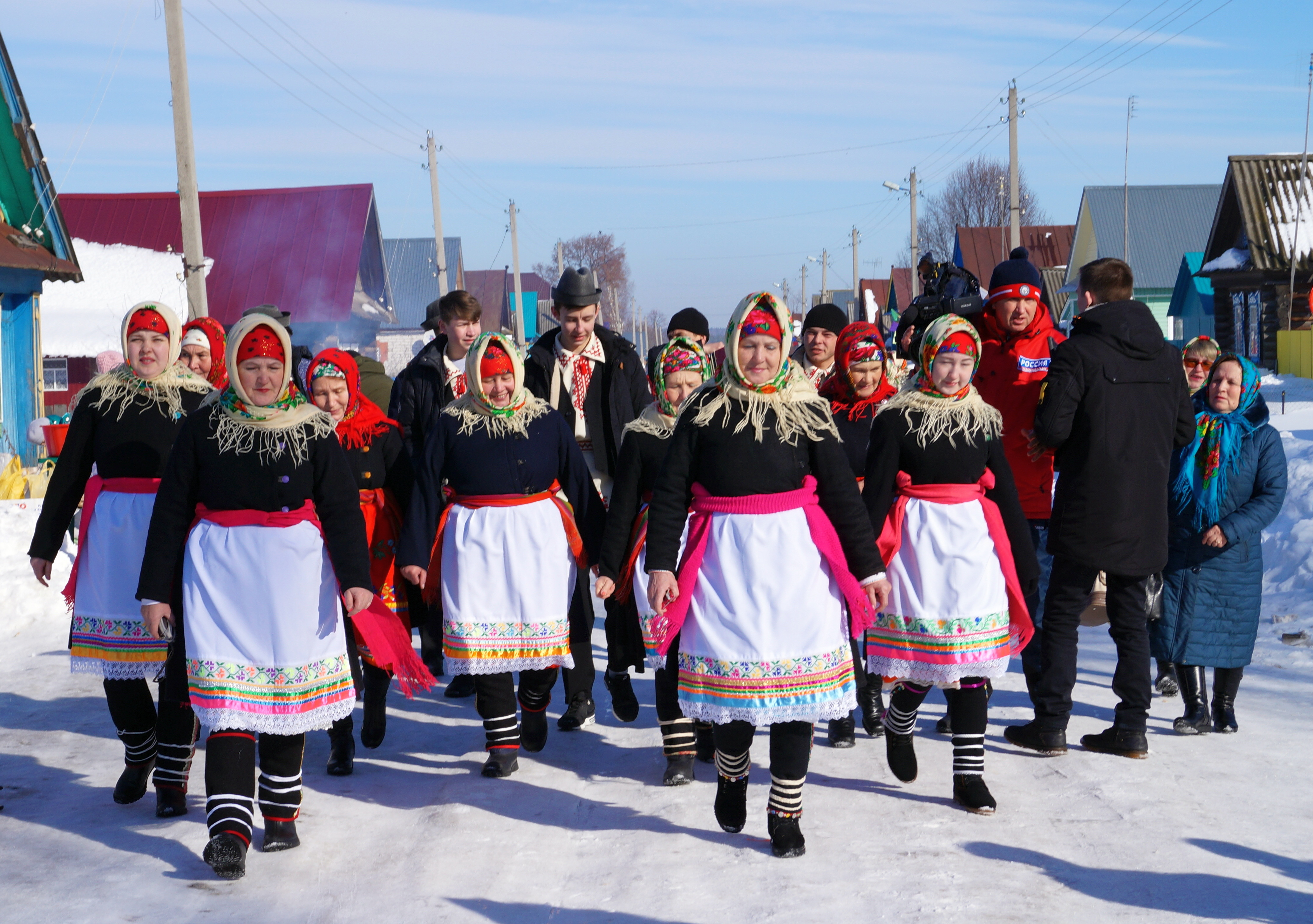 Марийский календарно-обрядовый праздник Ӱярня.